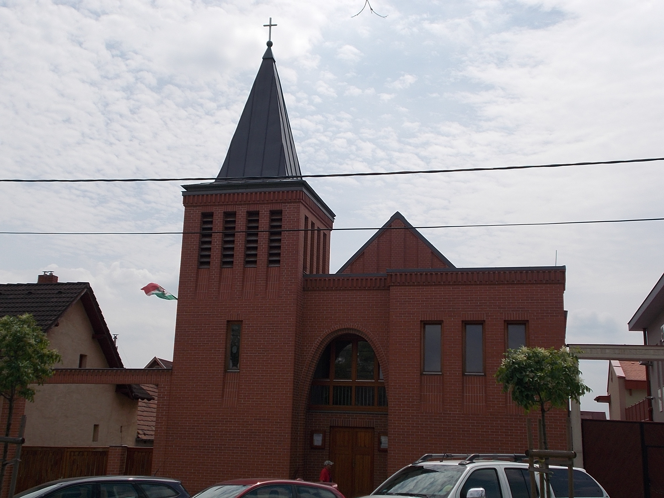 Budaörsi Evangélikus templom. (2003) - Budaörs, Szabadság út 75